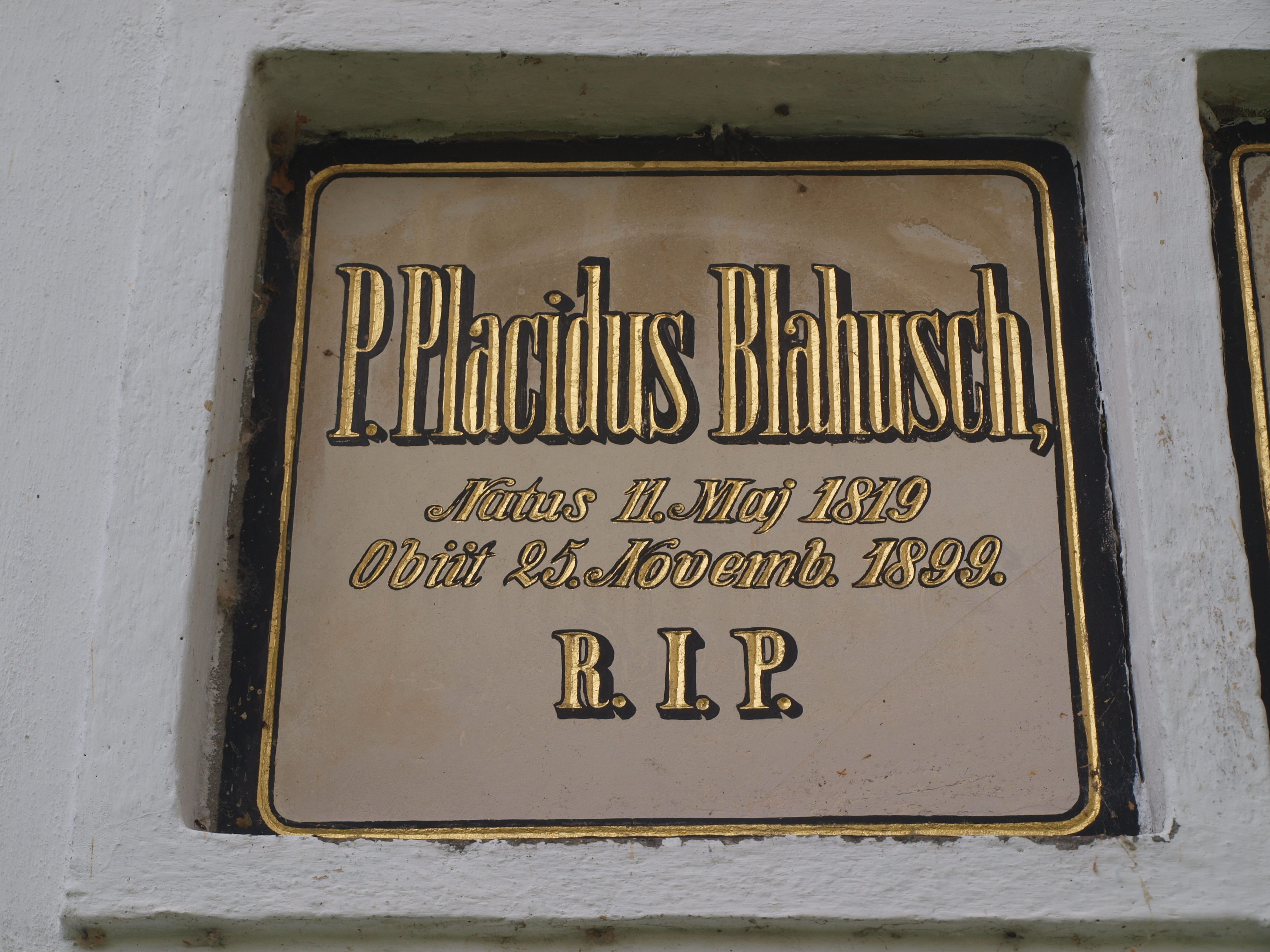 Tabulky se jmény a daty narození a úmrtí zemřelých mnichů umístěných na zdi kaple sv. Anny v areálu cisterciáckého kláštera ve Vyšším Brodě – Placidus Blahusch